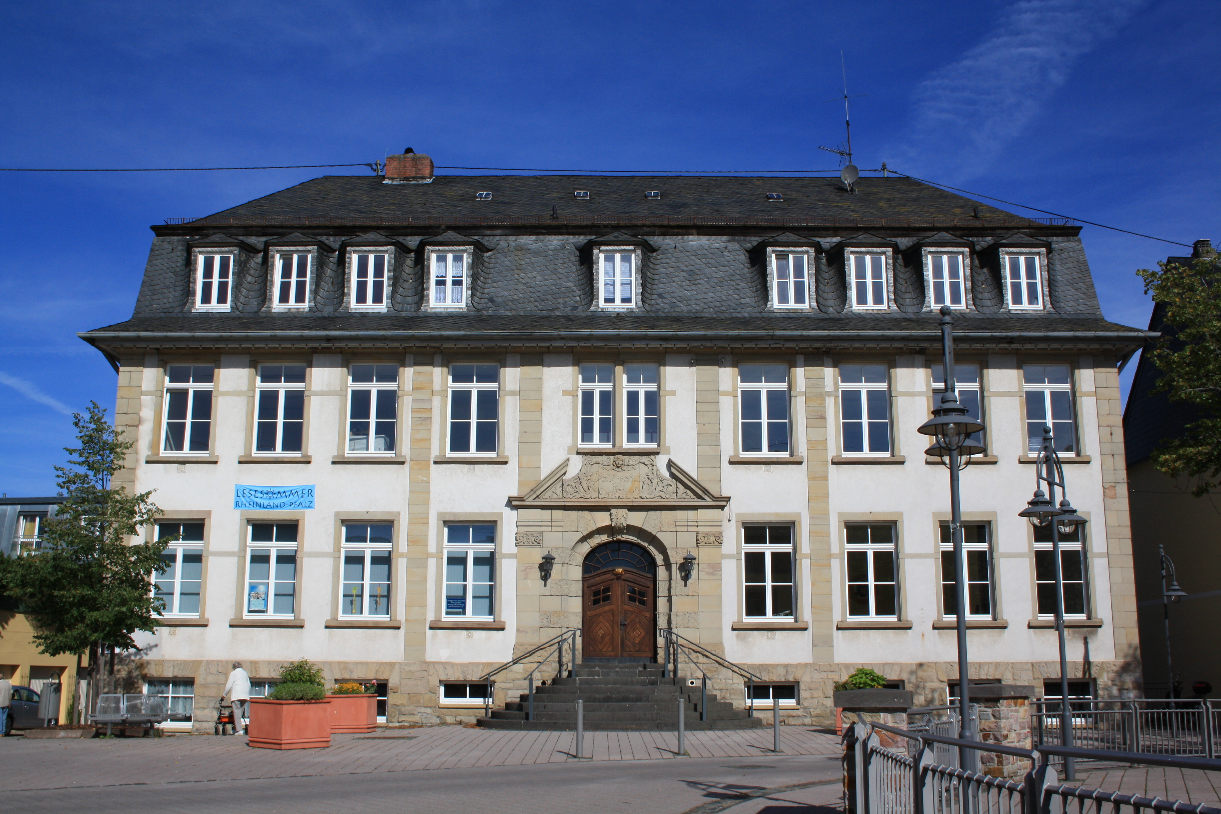 Alte Schule in Birkenfeld (Nahe)